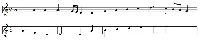 Мелодия 'Fors seulement' (автор неизвестен), использованная в шансон Иоанна Окегема (фрагмент сопрано)